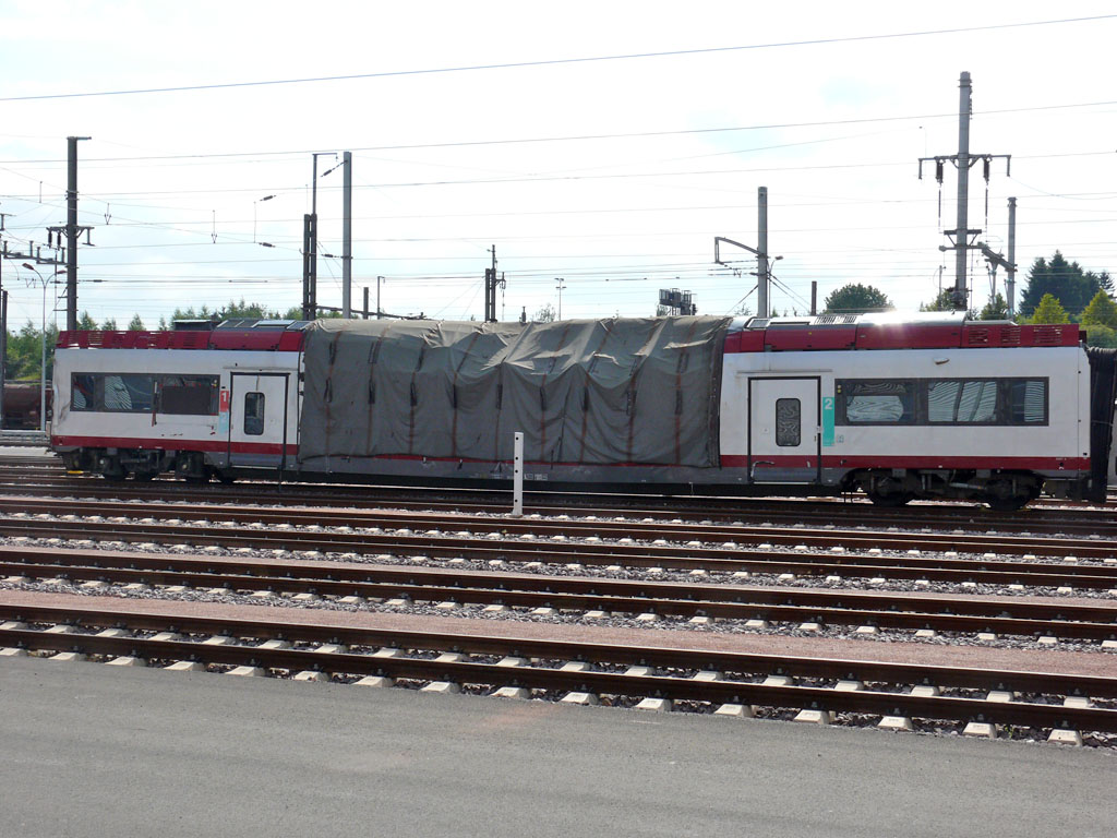 Automotrice avariée lors de l'accident de Zoufftgen